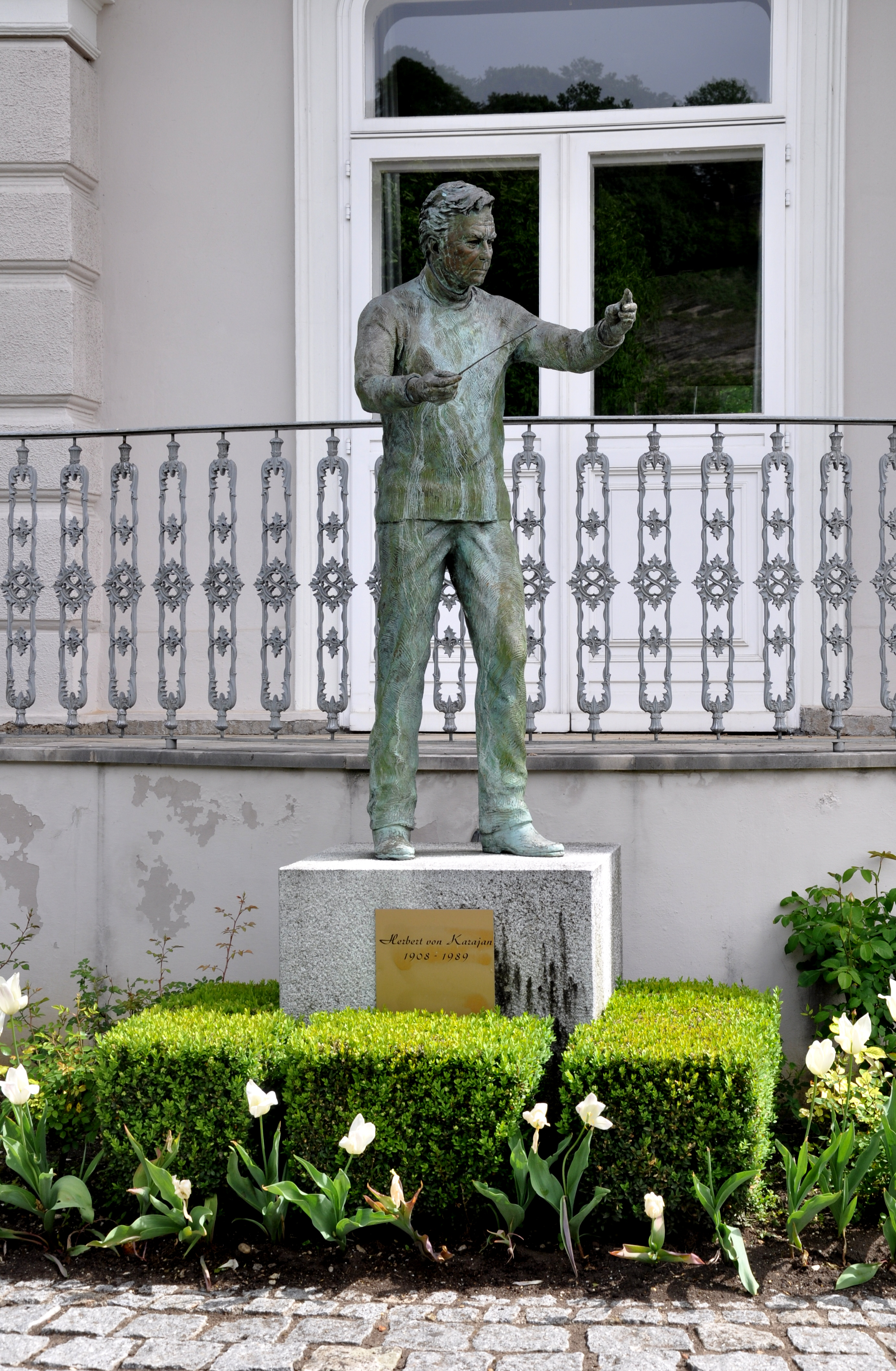 Salzburg, Statue "Herbert von Karajan" am (vermeintlichen) Geburtshaus des Dirigenten am Elisabethkai (Josef-Friedrich-Hummel-Straße 1)